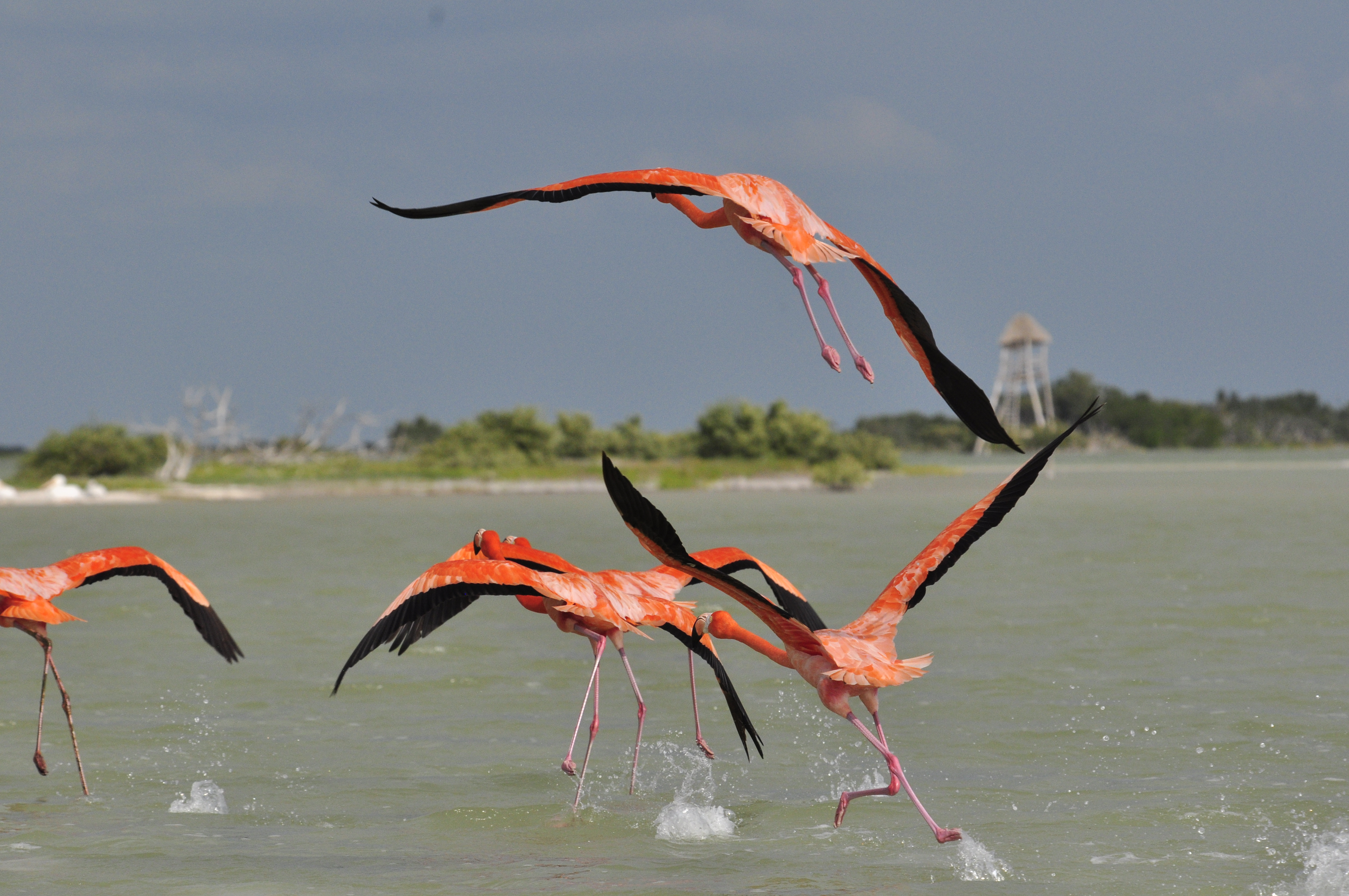 Flamingos en vuelo en la Reserva de Biosfera Ría Lagartos, México This is an image of the Biosphere Reserve or a Geopark: Ría Lagartos Biosphere Reserve